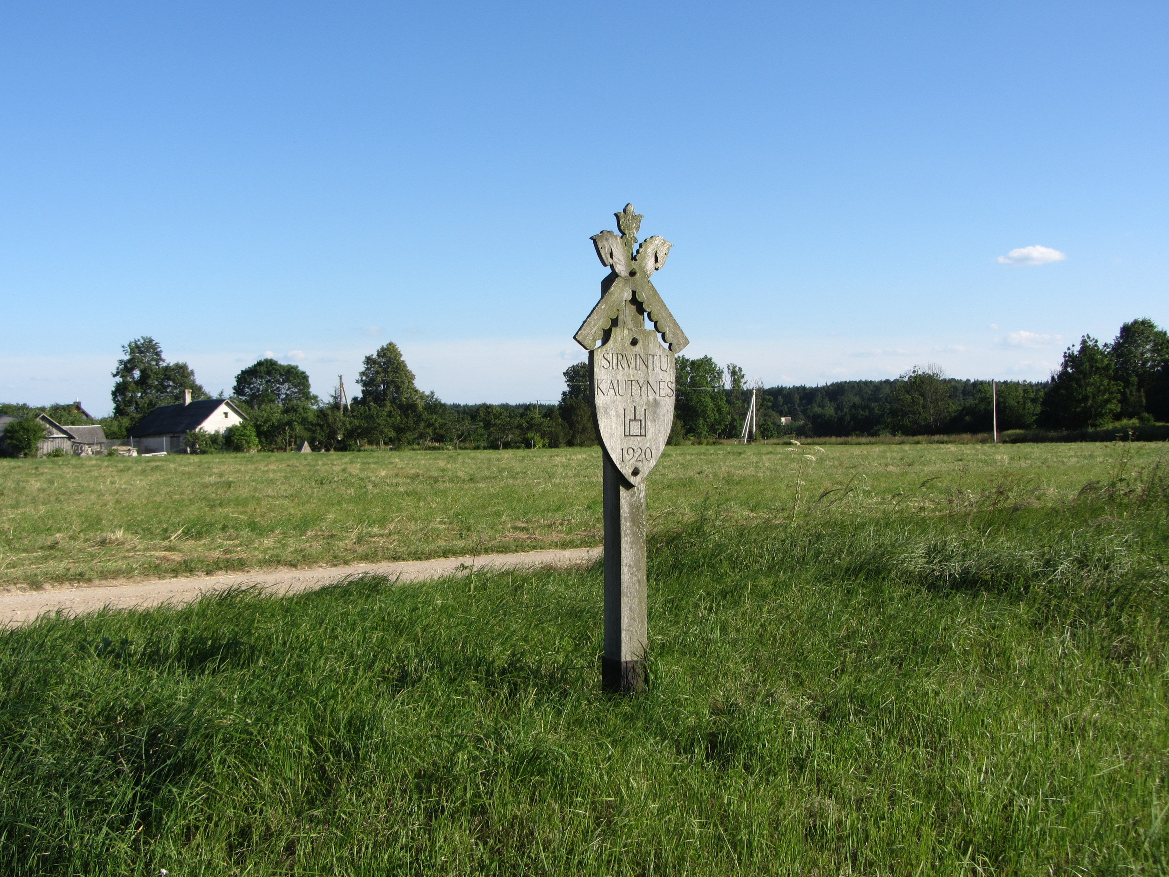 Širvintų sen., Lithuania